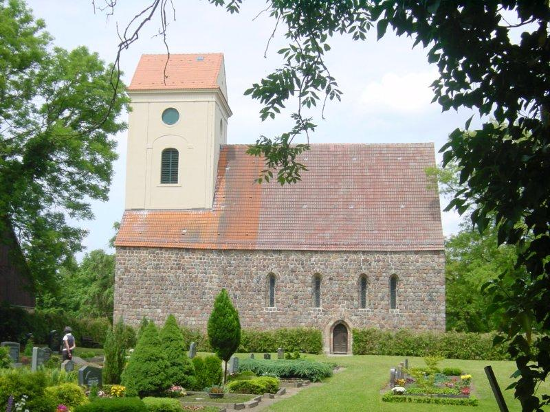 Denkmalgeschützte Dorfkirche Milow